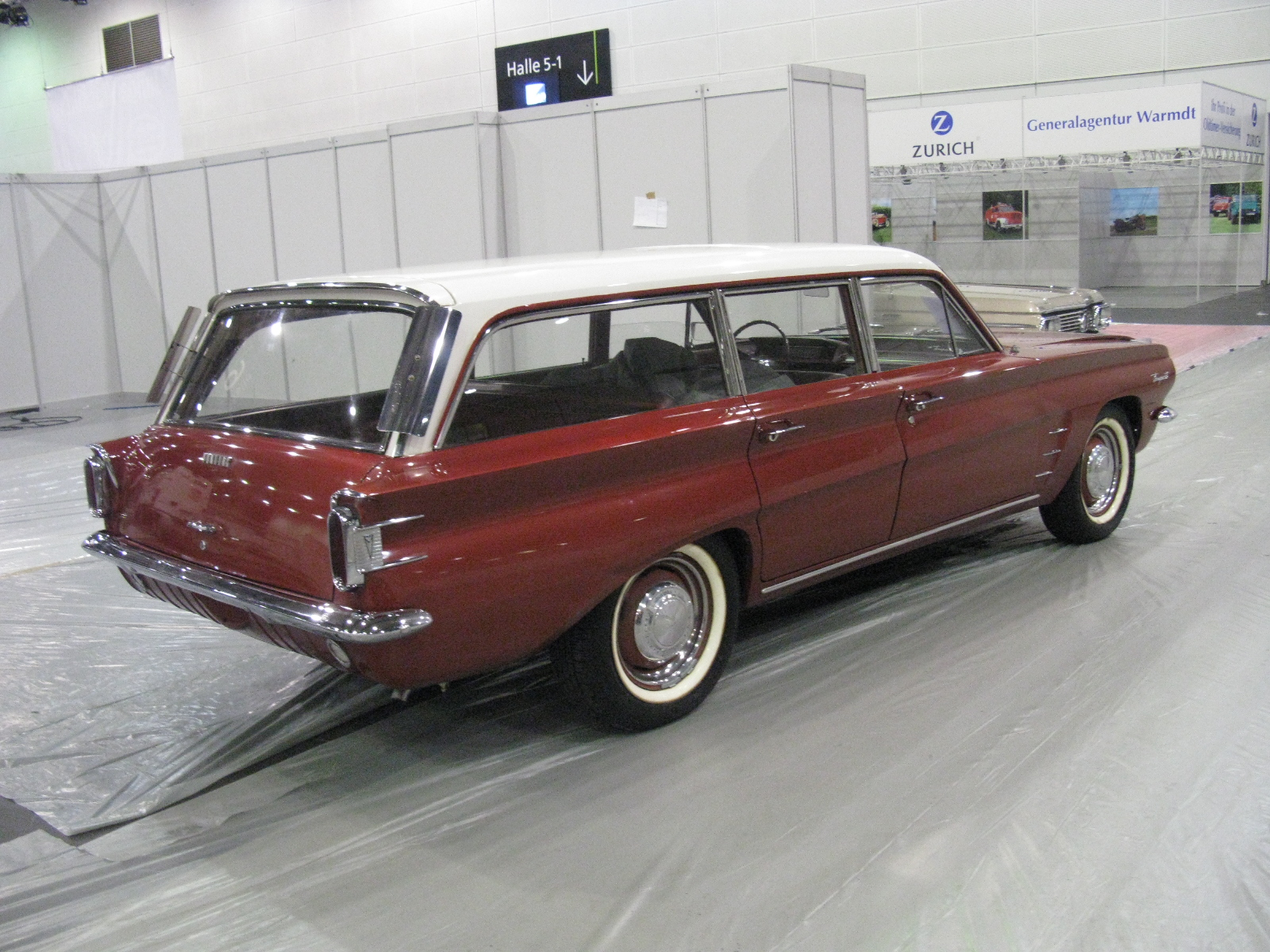 Pontiac Tempest Safari 1961